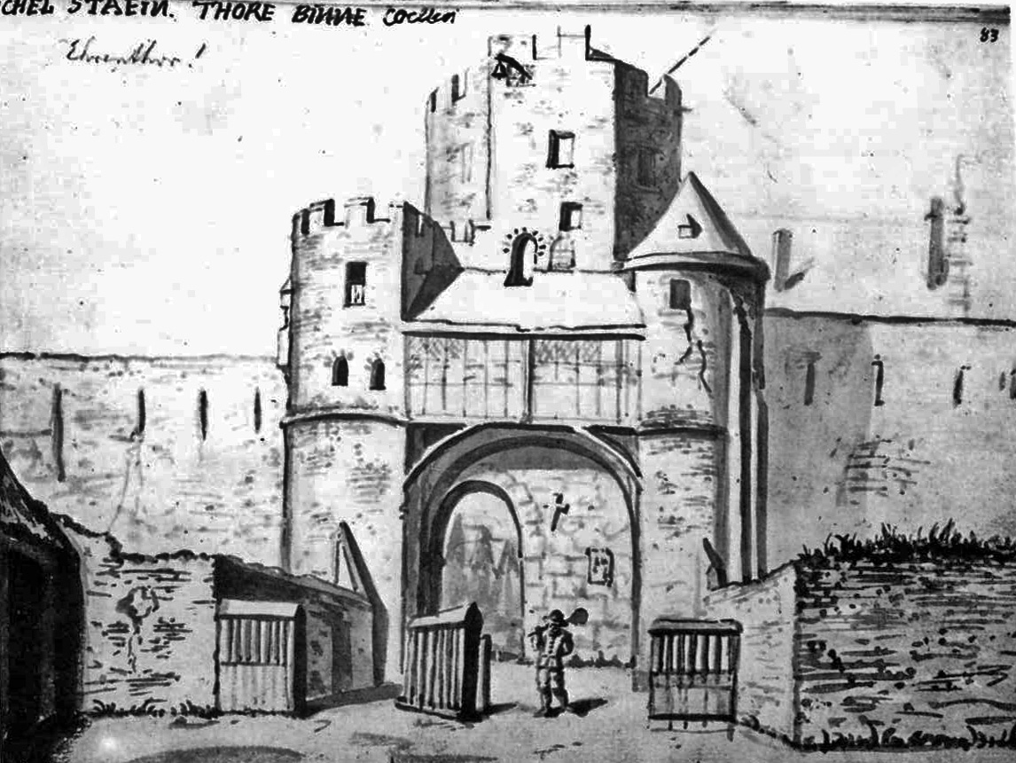 Ehrentor, Köln 17. Jahrhundert